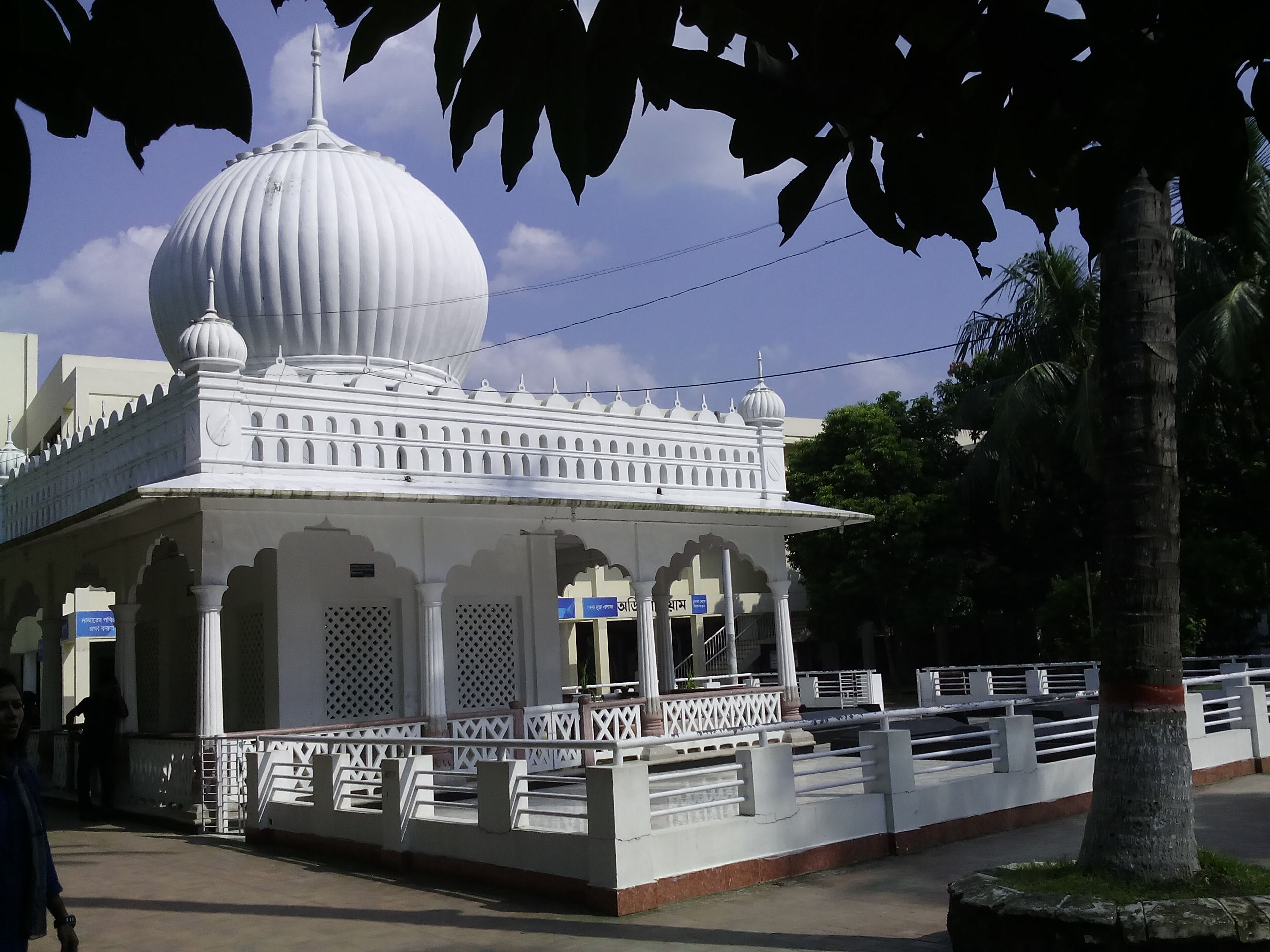 লালন শাহের মাজার